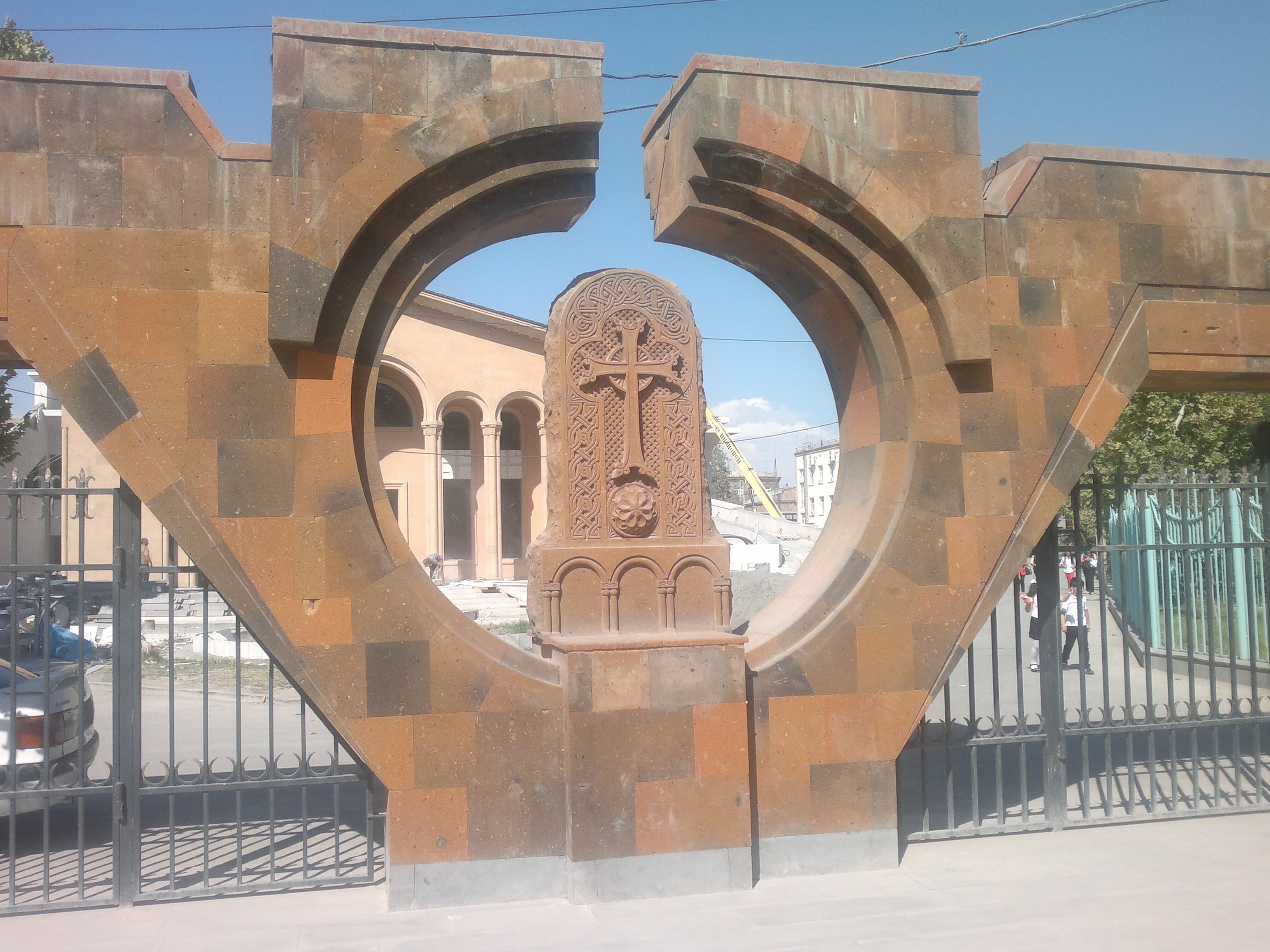 Պանթեոն` Կոմիտասի Անվան Զբոսայգու 11/19